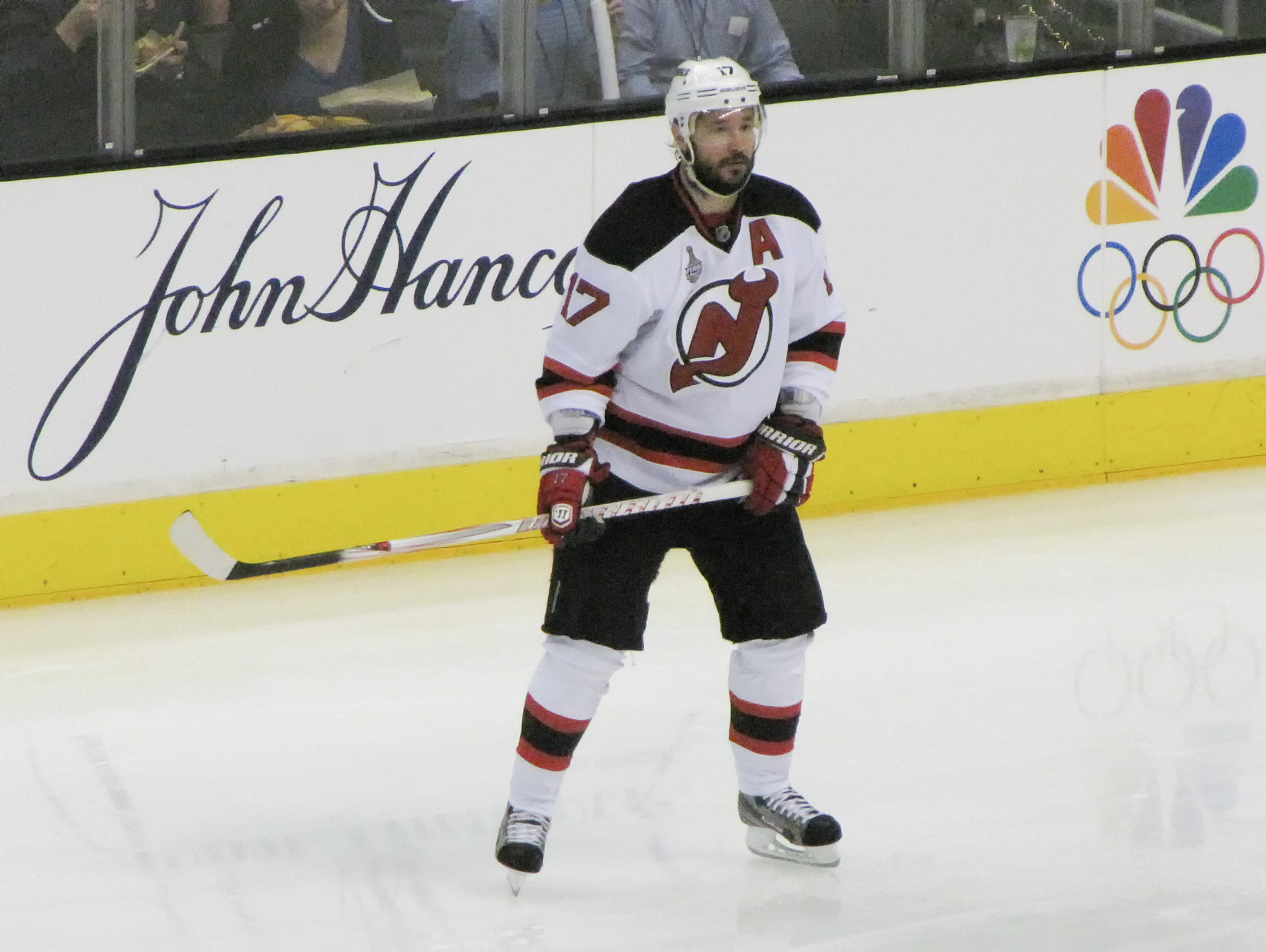 Илья́ Ковальчу́к (Ilya Kovalchuk)